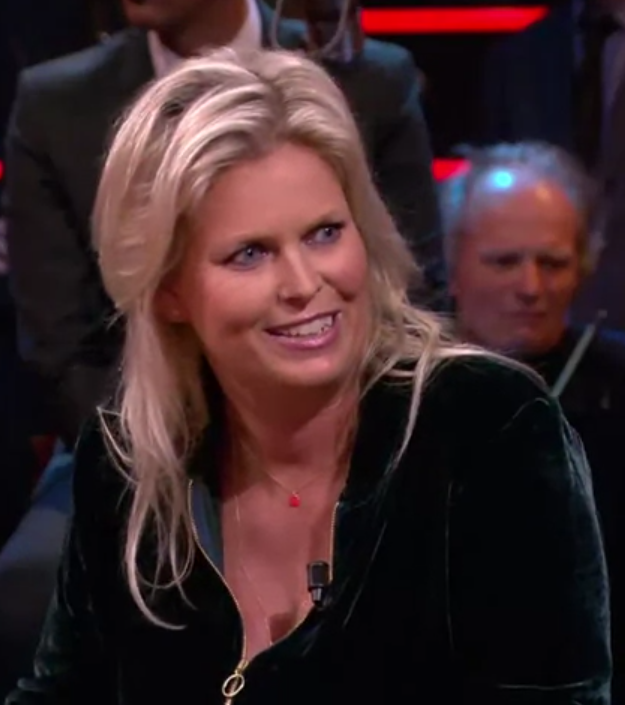 Antoinnette Scheulderman over haar eigen ervaringen met -MeToo